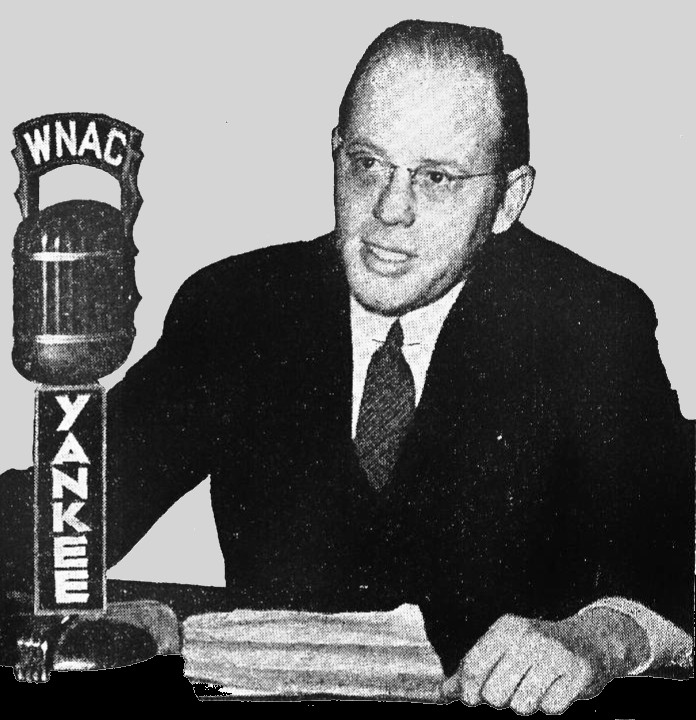 Tom Hussey